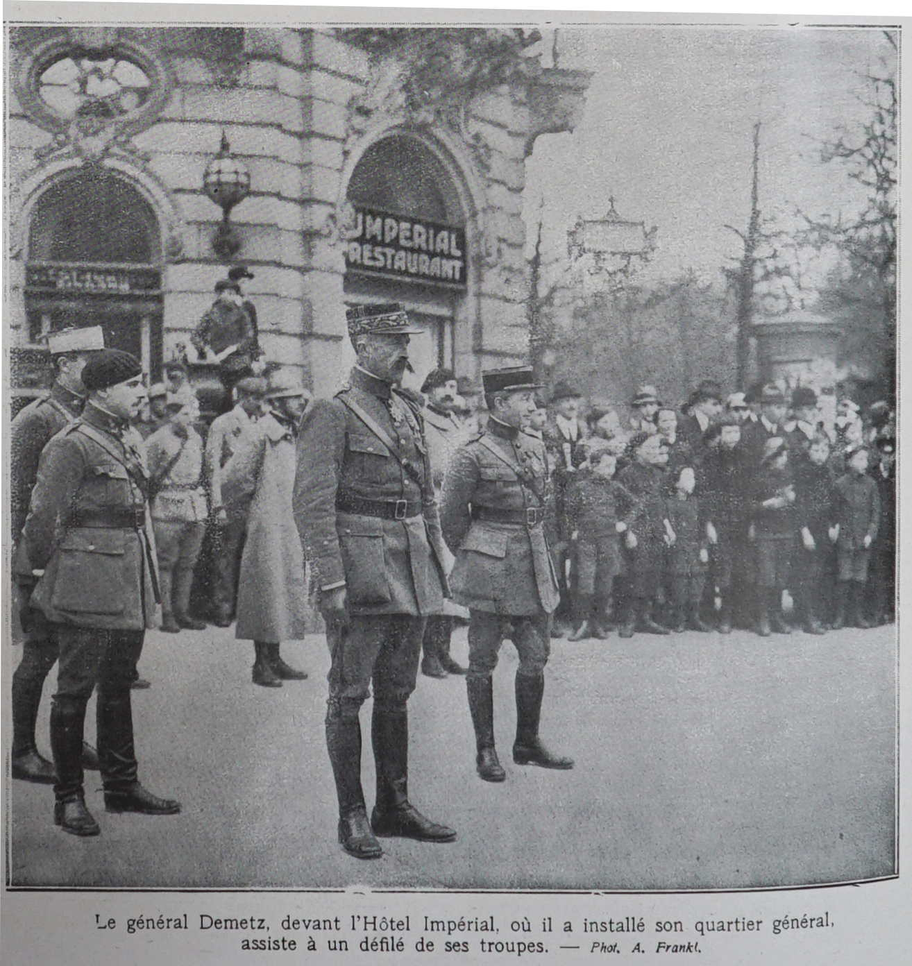 présenté dans le journal L'Illustration de 1920. les événements du 6 mai 1920